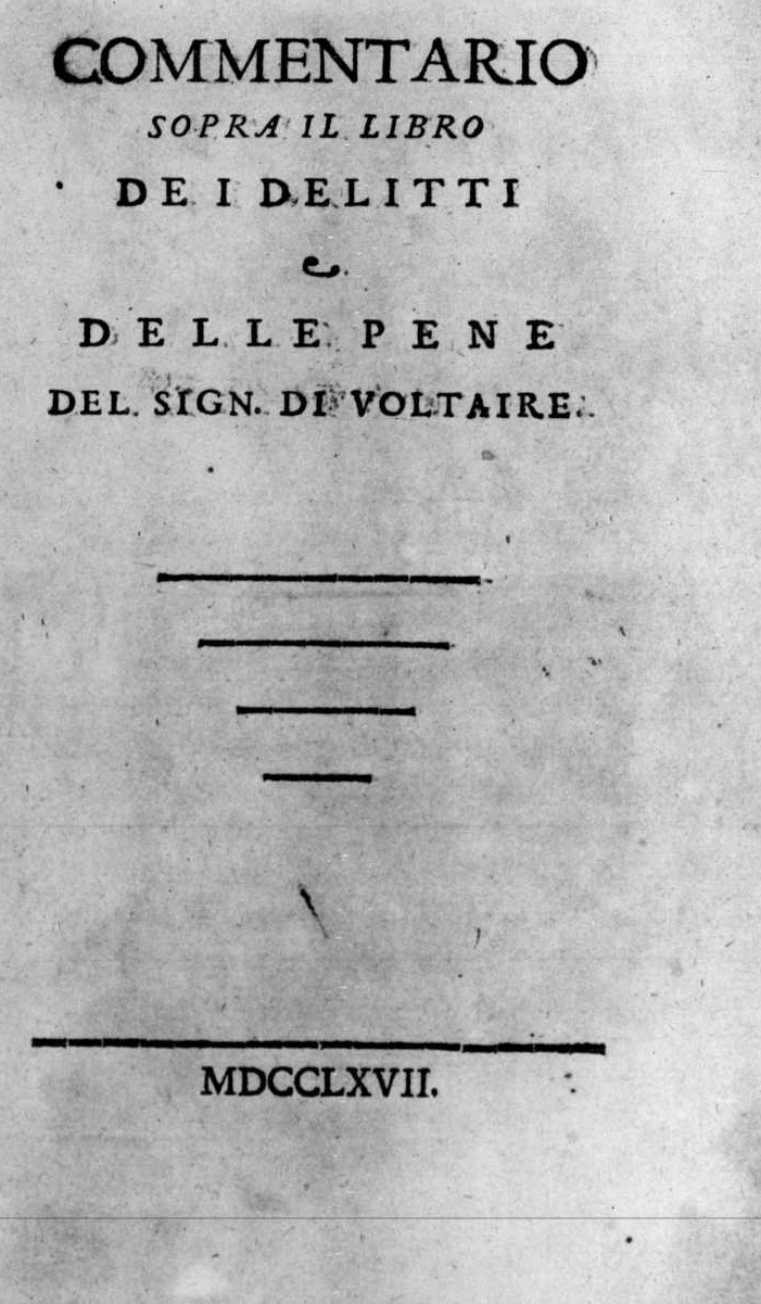 Frontespizio